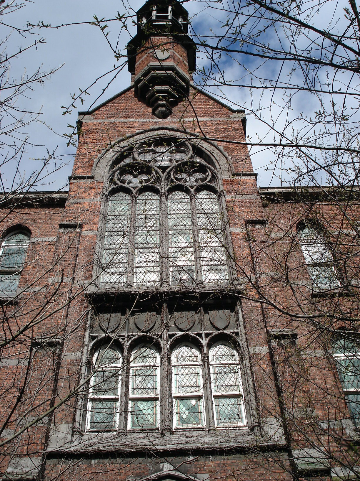 Franciscanessenklooster, Lange Kongostraat, te Antwerpen. Arch. Jules Bilmeyer.